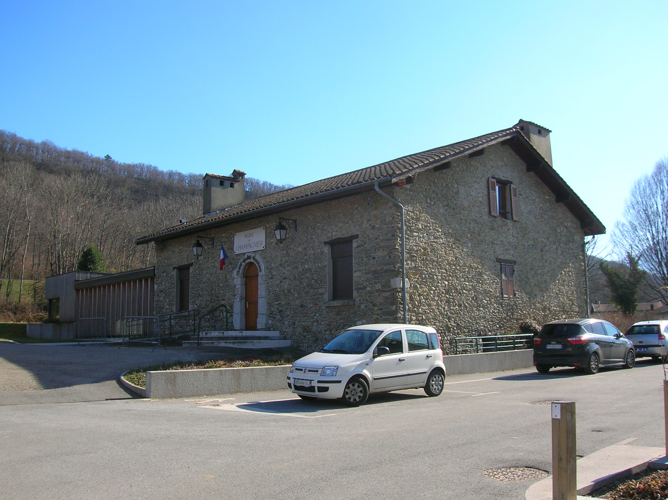 Mairie. Champagnier, Isère, AuRA, France.